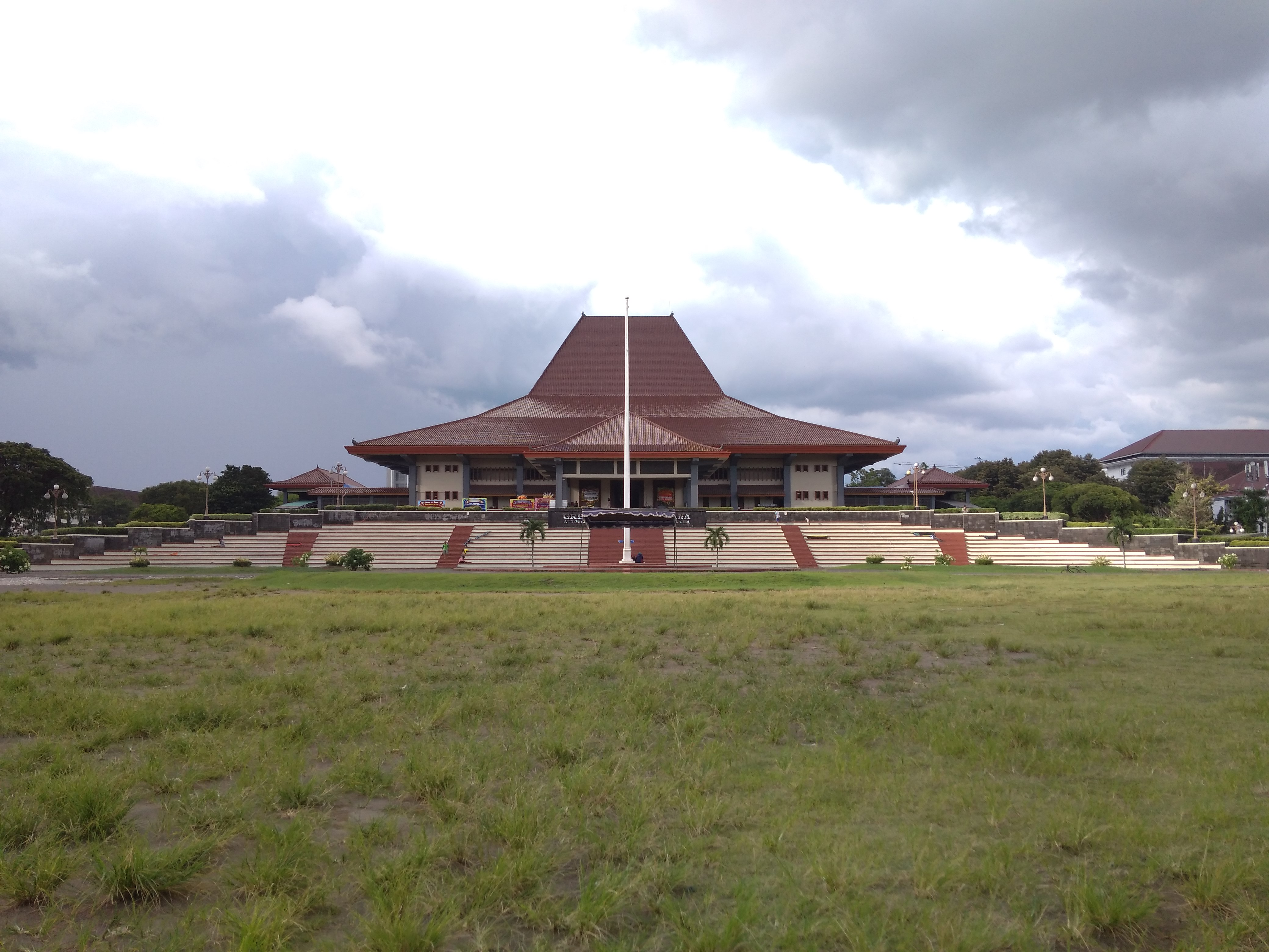 Gedung Grha Sabha Pramana di Universitas Gadjah Mada